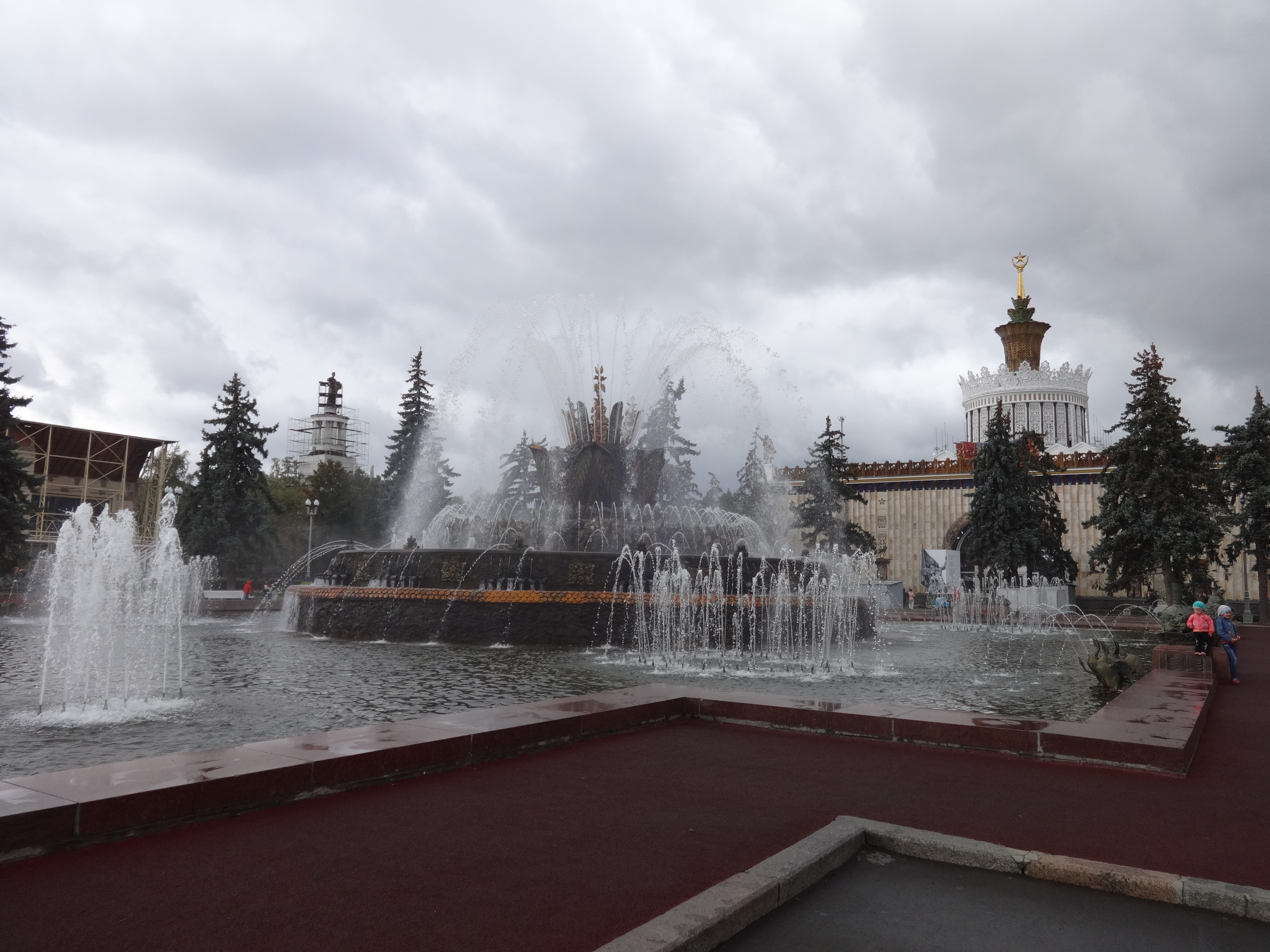 Фонтан «Каменный цветок» (Москва и Московская область, Москва, Мира проспект, 115)